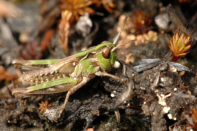 Myrmeleotettix maculatus from Commanster, Belgian High Ardennes .